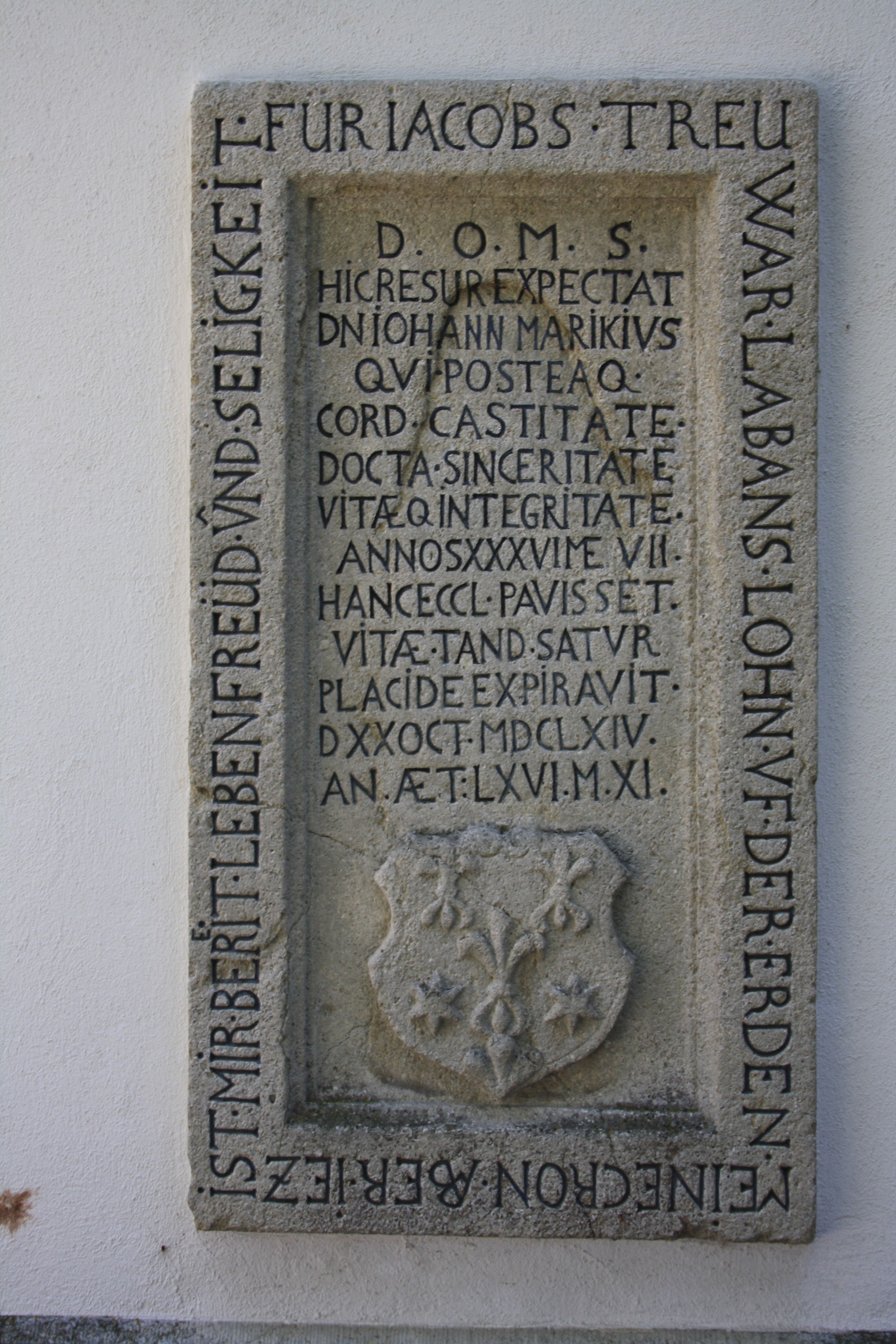 Kirche Rein AG, Grabplatte von 1664